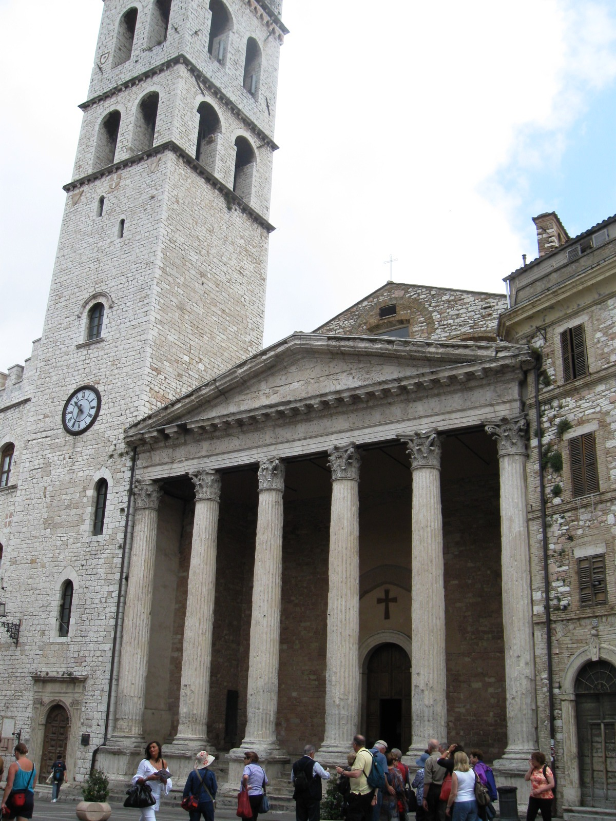 Foro_Romano_a_Piazza_Commune רישיון נוצר על ידי משתמש:Daniel Ventura